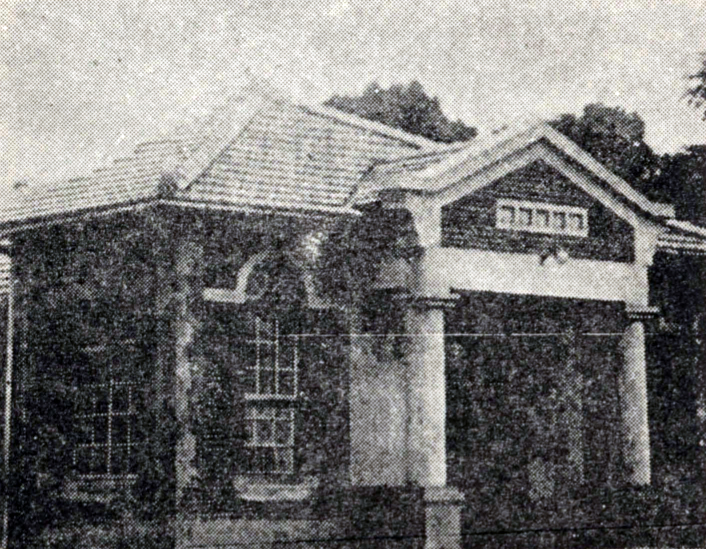 新竹州苗栗郡銅鑼庄役場